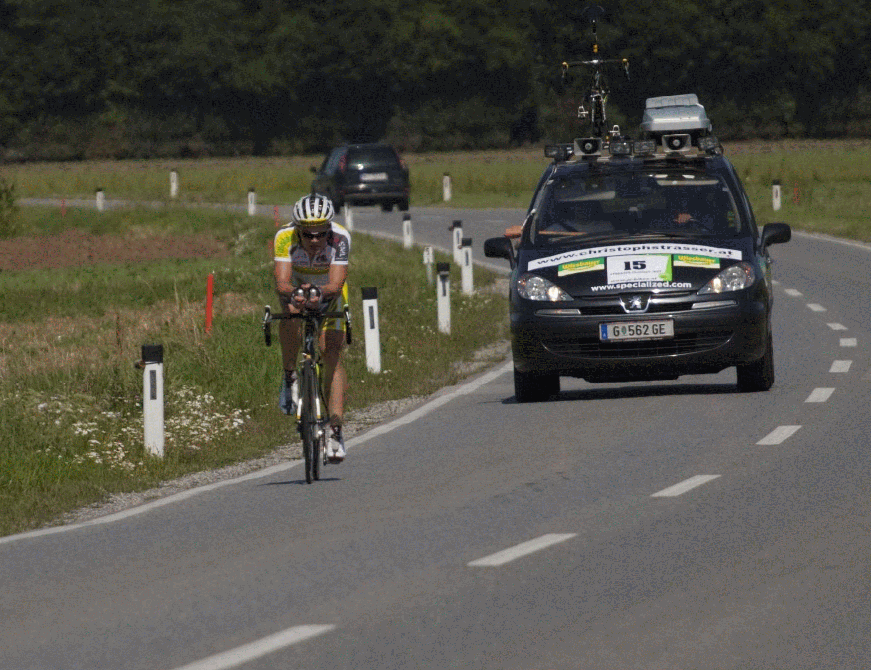 Extremradfahrer Christoph Strasser beim Race Around Austria.